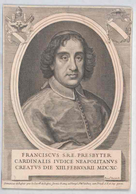 Cardeal Francesco del Giudice.